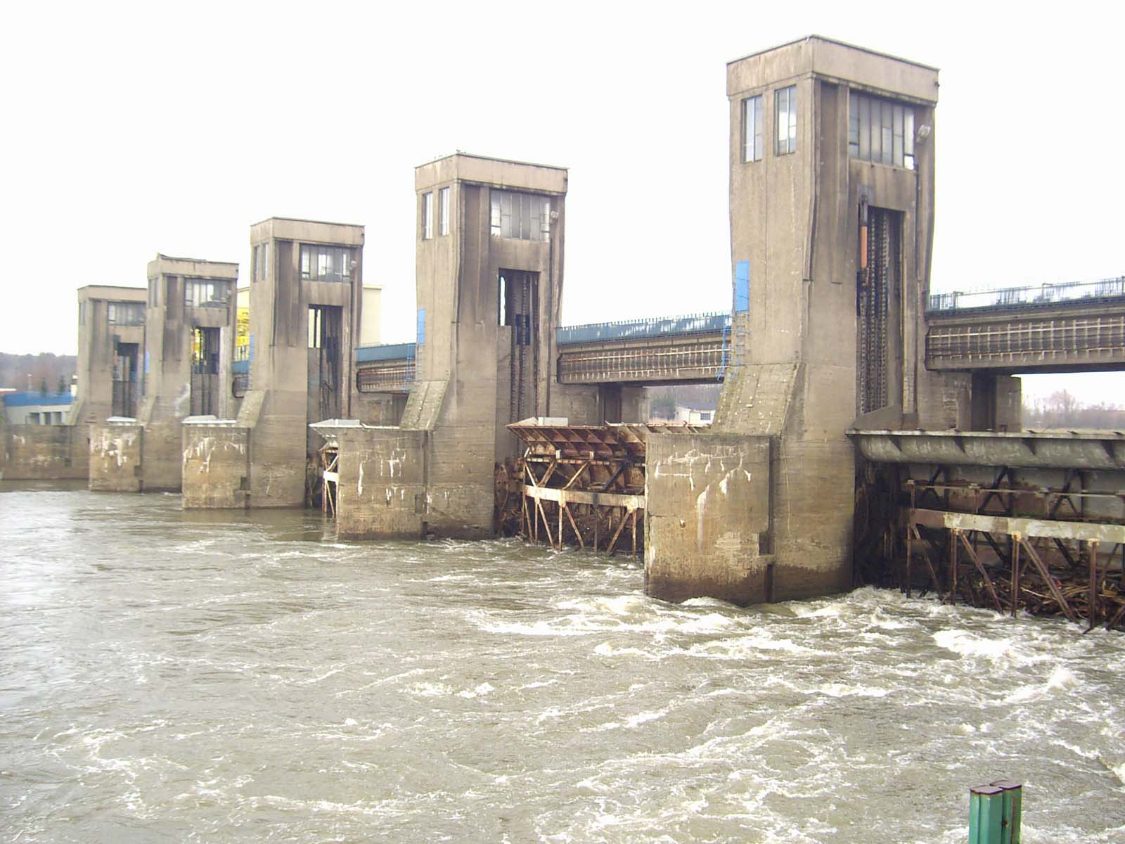 Jaz Brzeg Dolny wraz z elektrownią Wały Śląśkie